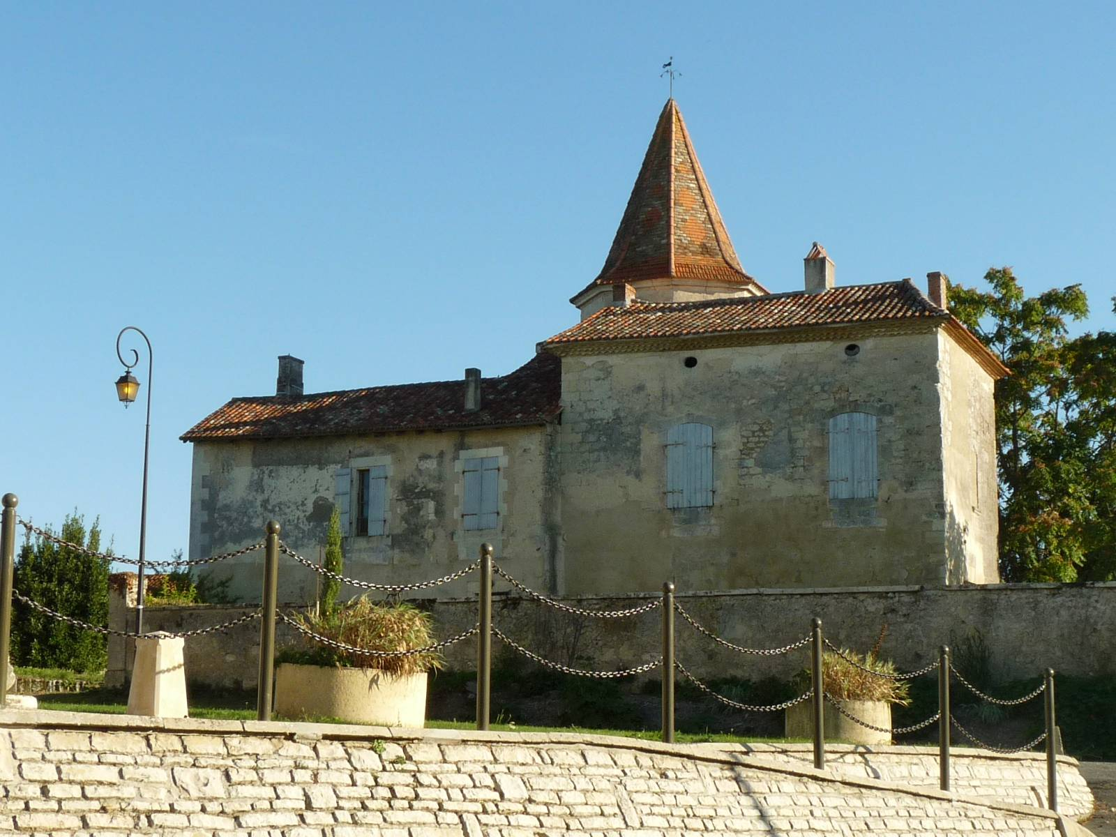 maison-château à Allemans (24), France